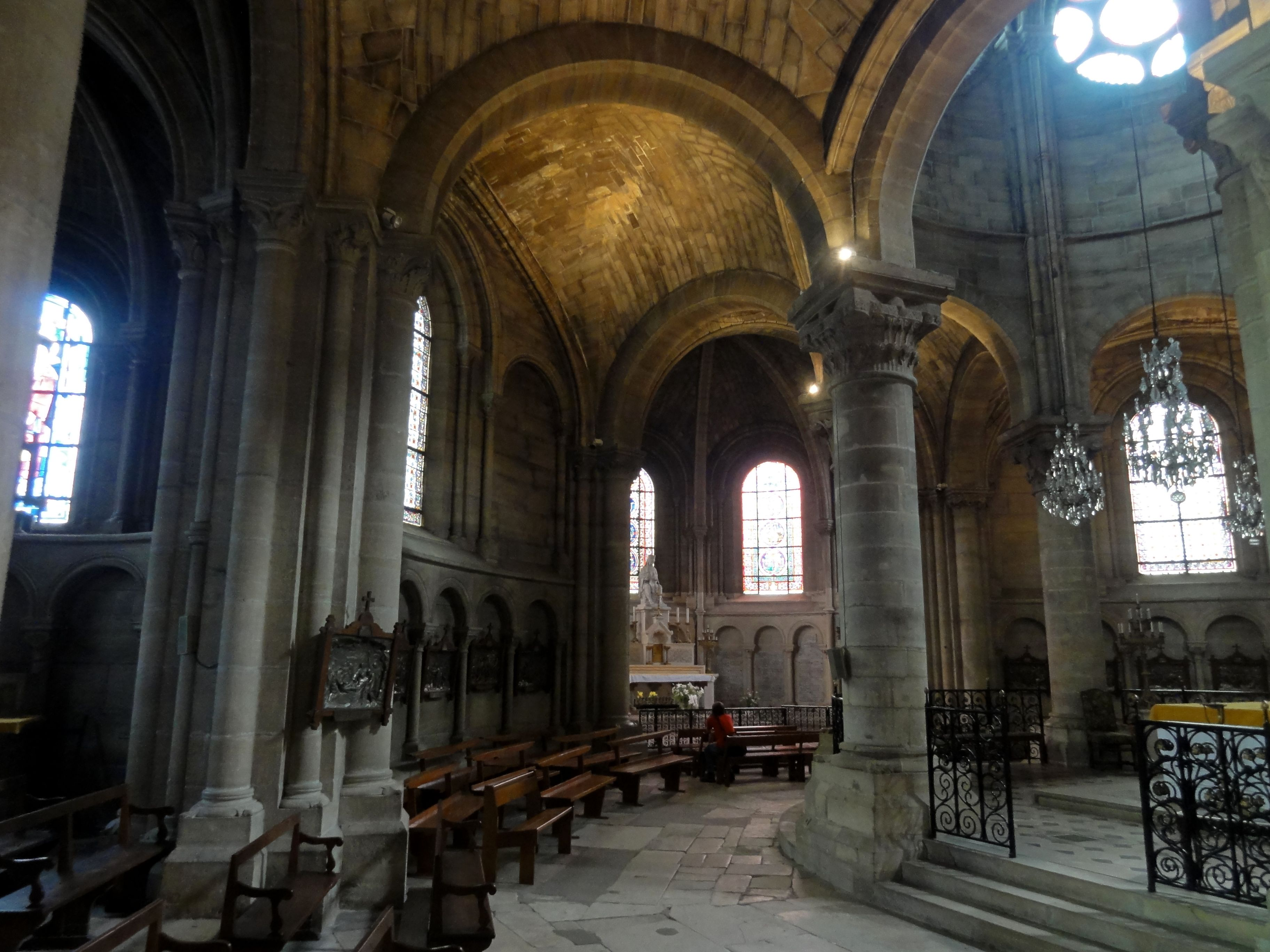 Déambulatoire.